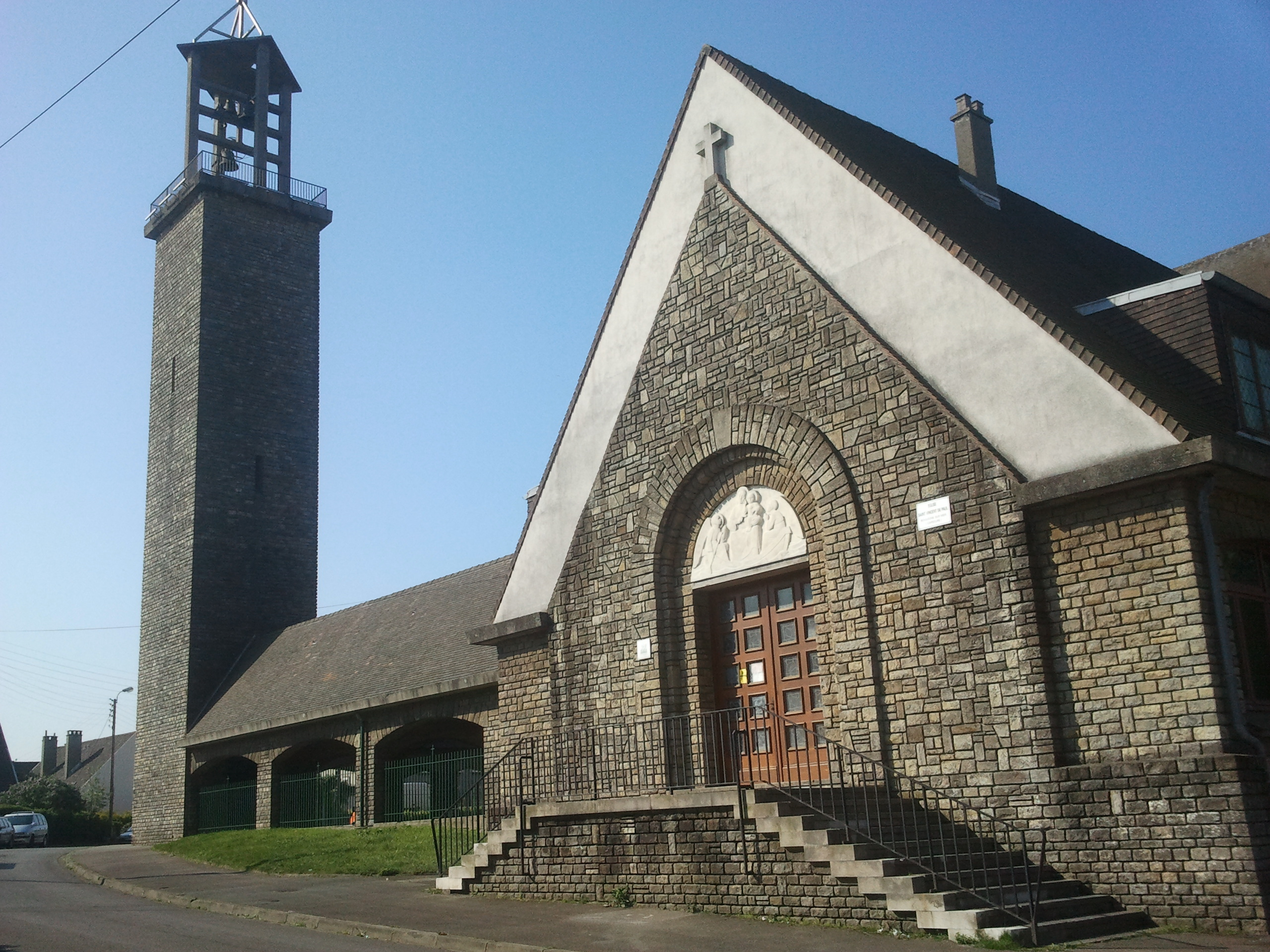 Église Saint-Vincent de Paul vue de la rue de la Libération, Boulogne-sur-Mer, France